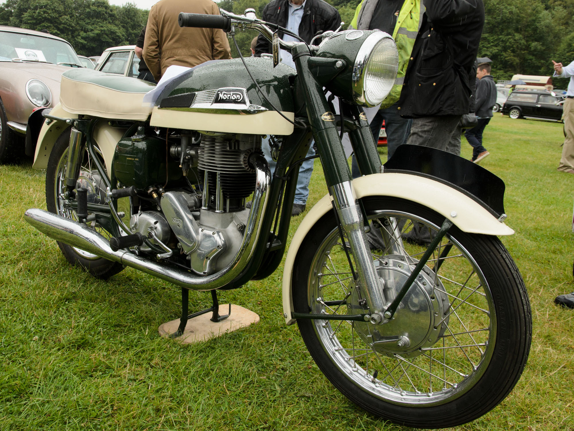 Hebden Bridge Vintage Weekend 01/08/2015